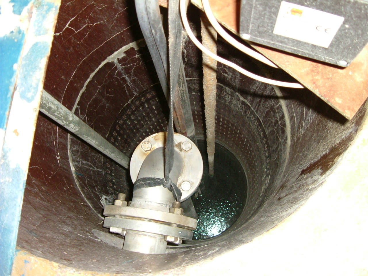 Quellfassung der Thermalquelle "Rosenquelle" in Burtscheid